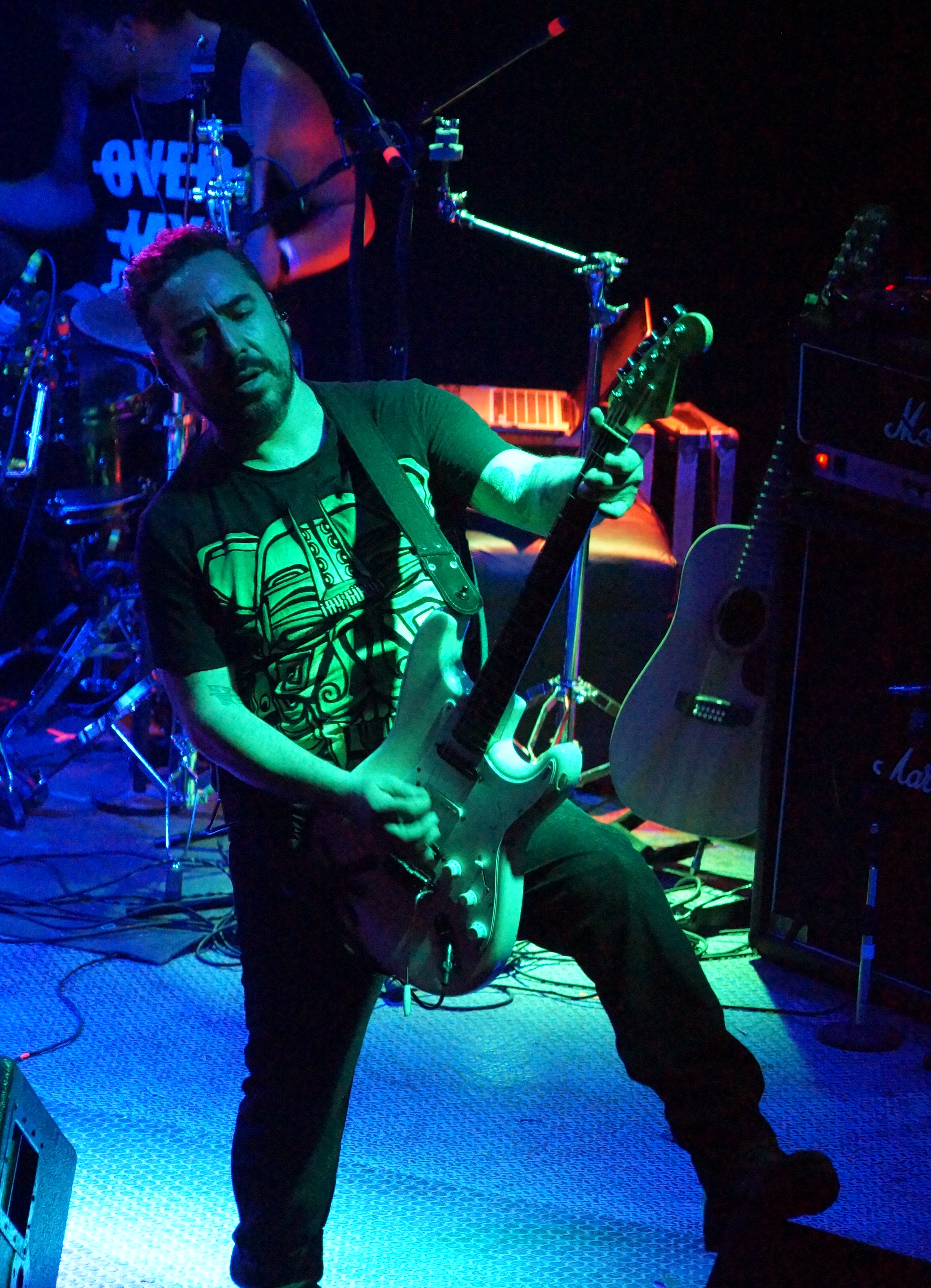 Radio Kaos en vivo